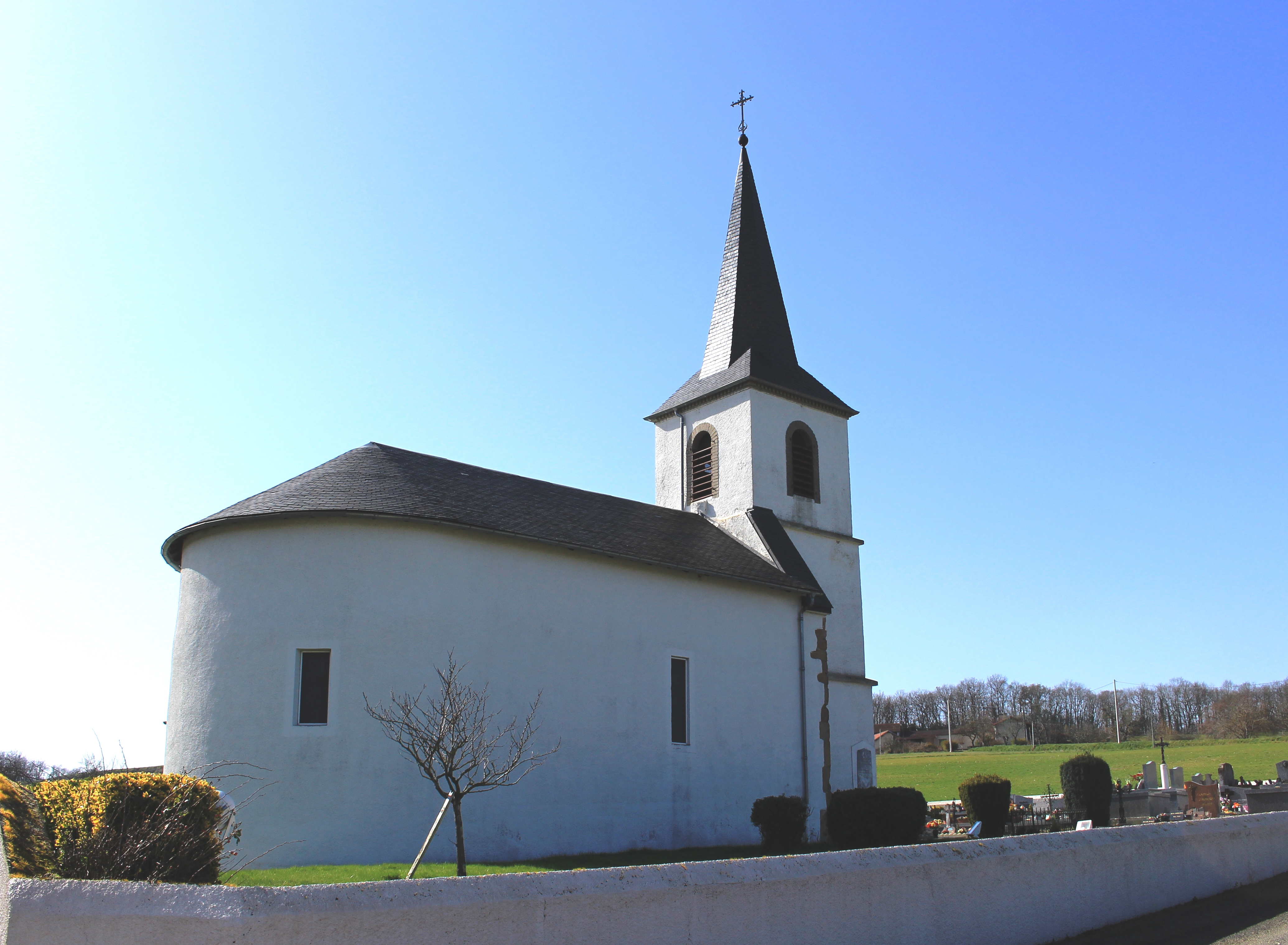 Église Saint-Laurent de Moumoulous (Hautes-Pyrénées)